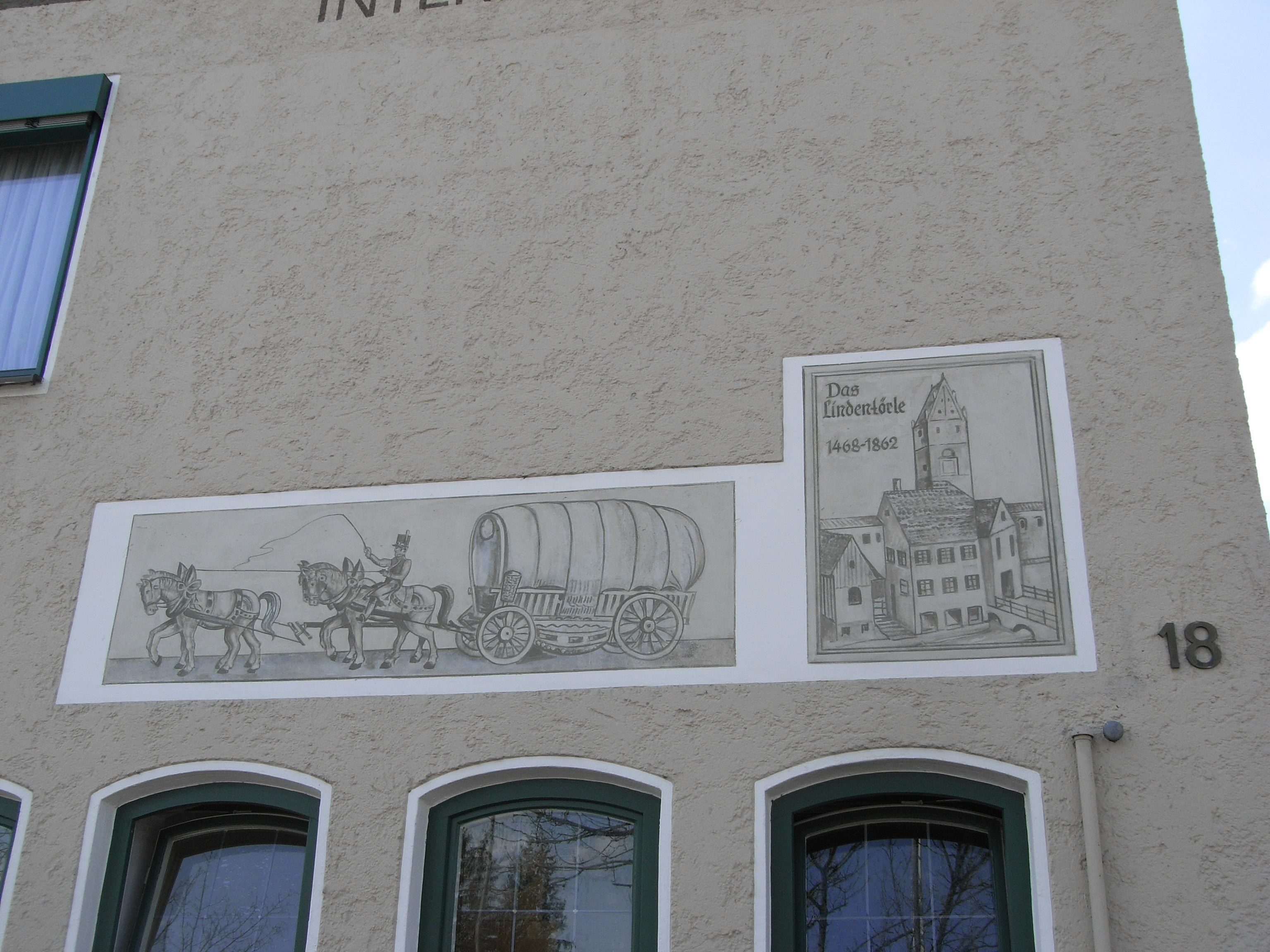 Eine Erinnerungstafel an das Lindentörlein am Epple-Haus